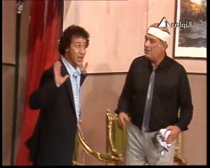 صورة من المسرحية 2